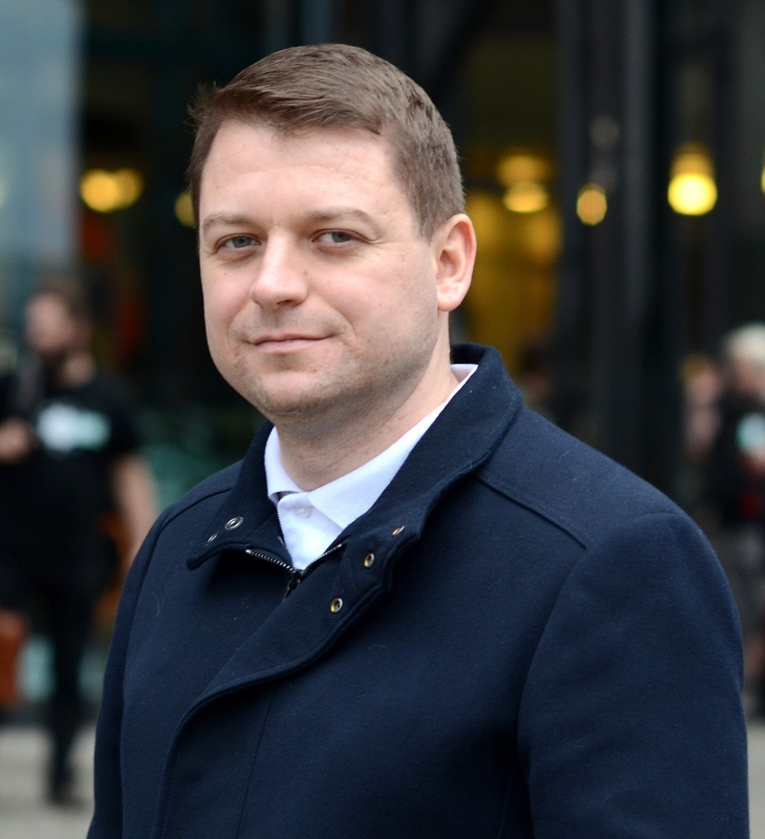 Poslanec Tomáš Martínek v roce 2020